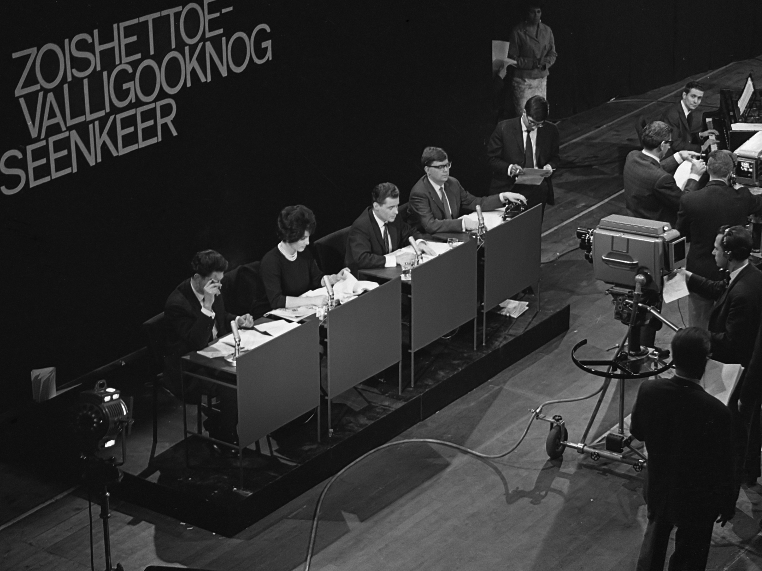 Programma "Zo is het toevallig ook nog een keer" van de VARA 7 december 1963